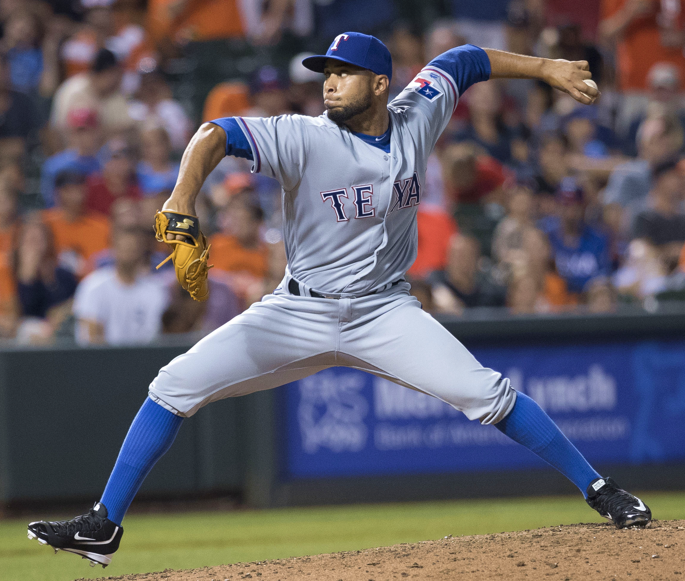 Darío Álvarez